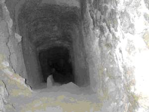 Mina di Zolfo in Sicilia